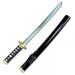 Foto da Arma Kodachi